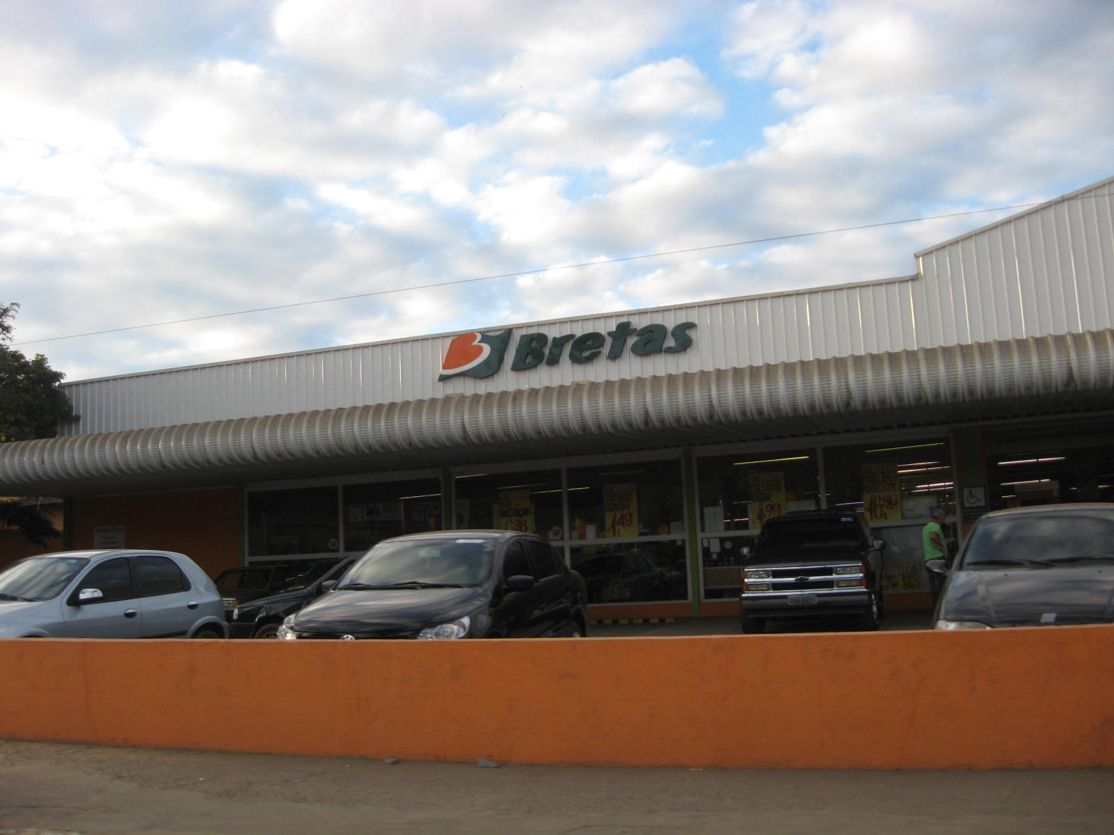 Vista do supermercado Bretas em Belo Horizonte, Minas Gerais, Brasil.